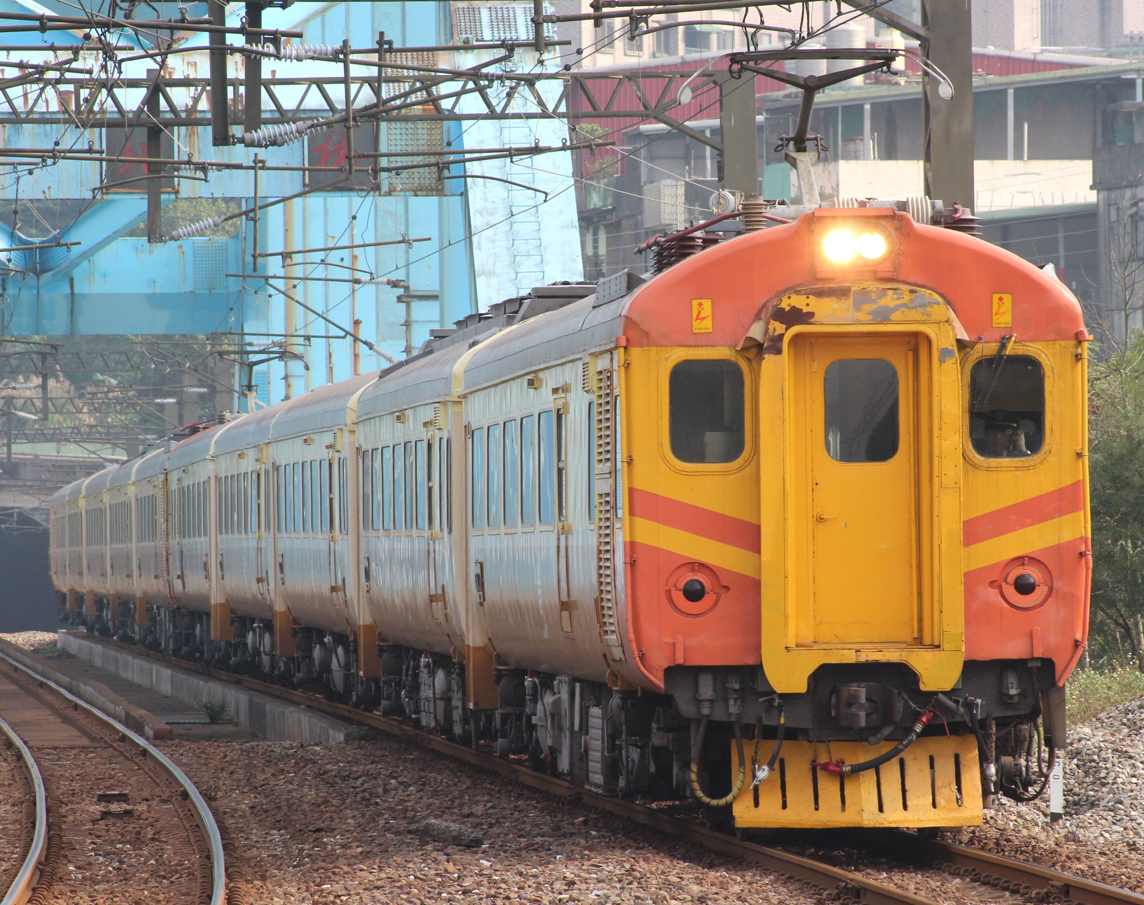 台湾鉄路管理局EMU100型電車 八堵鉄橋